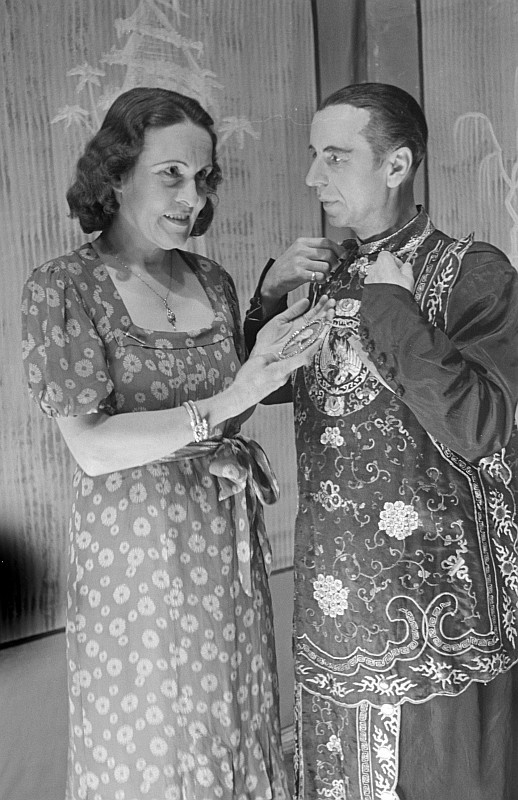 Original image description from the Deutsche Fotothek Szenenbilder